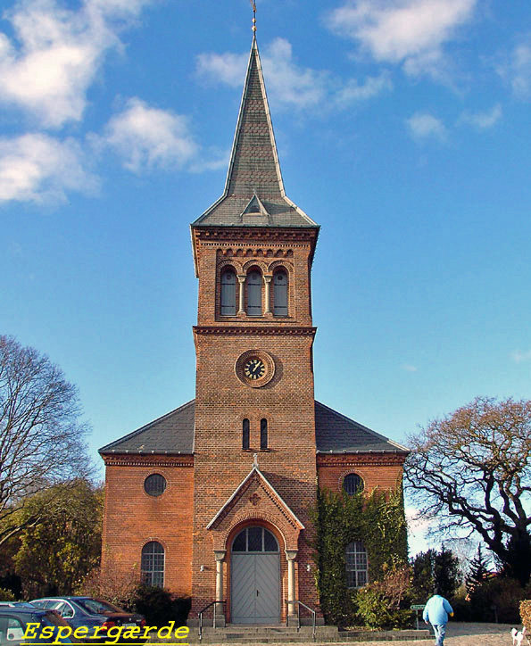 fra øst